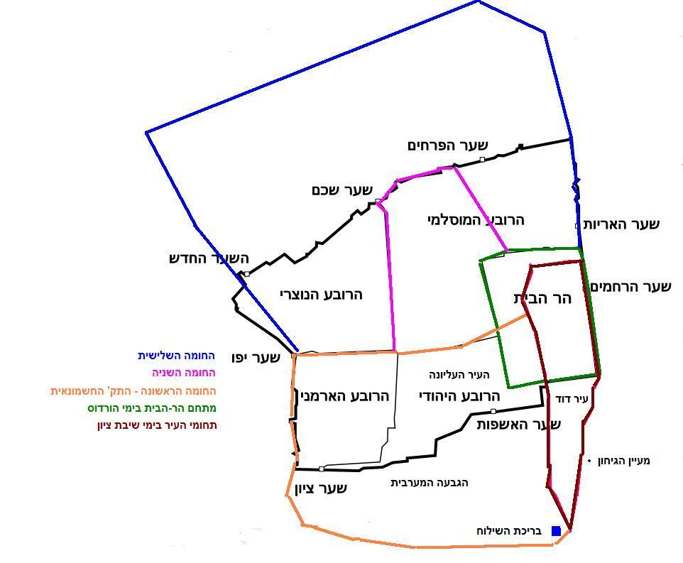 תיאור סכמטי של חומות ירושלים בתקופת בית שני. מסתמך על שרטוט חומות העיר העתיקה בימינו: Jerusalem oldcity hebrew.svg